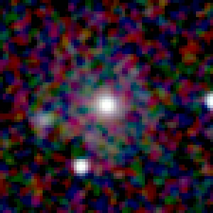 Galaxy NGC 60